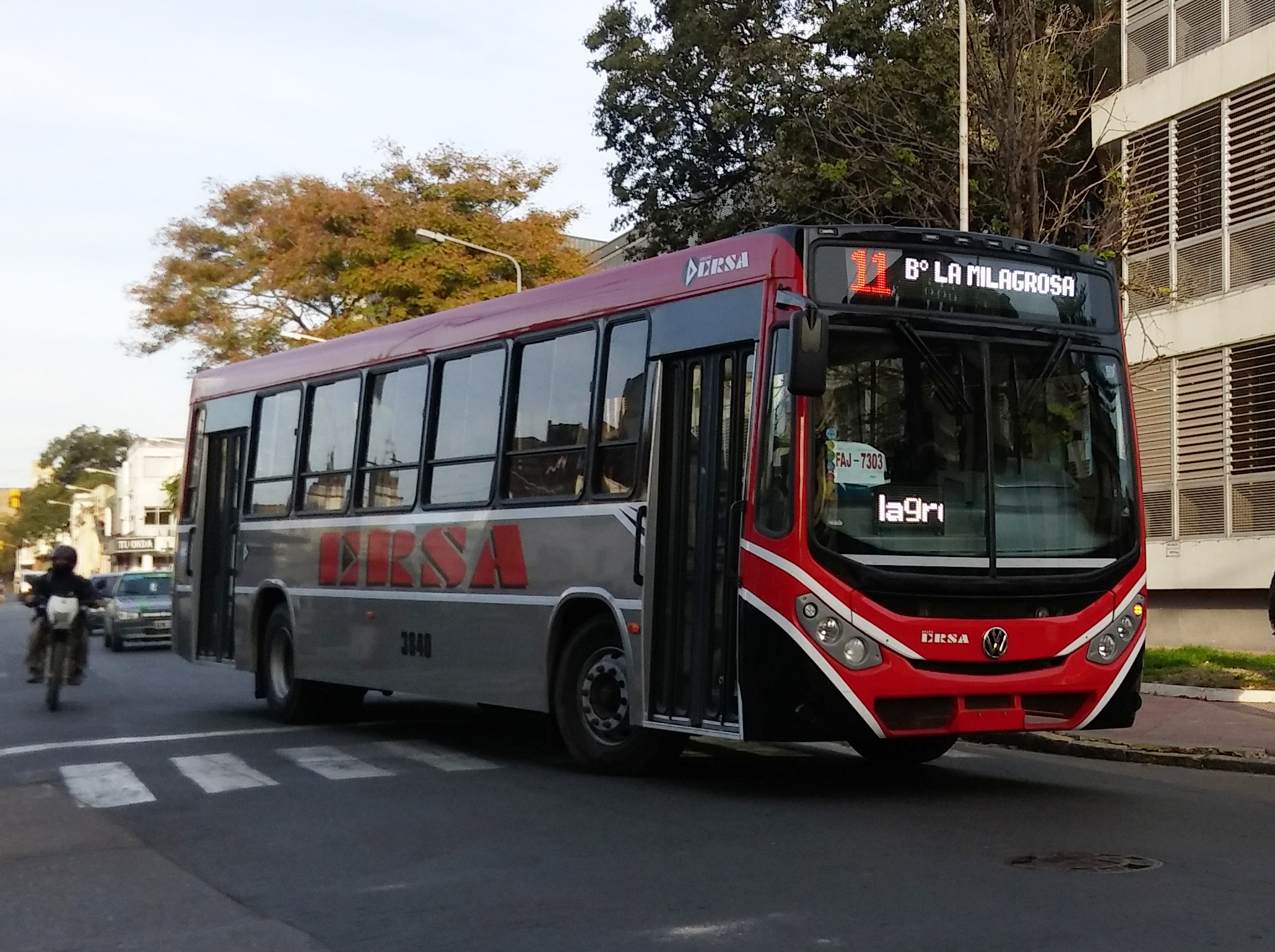 Interno 3840 de la línea 11 de ERSA Urbano Paraná Carrocería Metalpar sobre chasis Volkswagen 17.230-EOD Euro 5